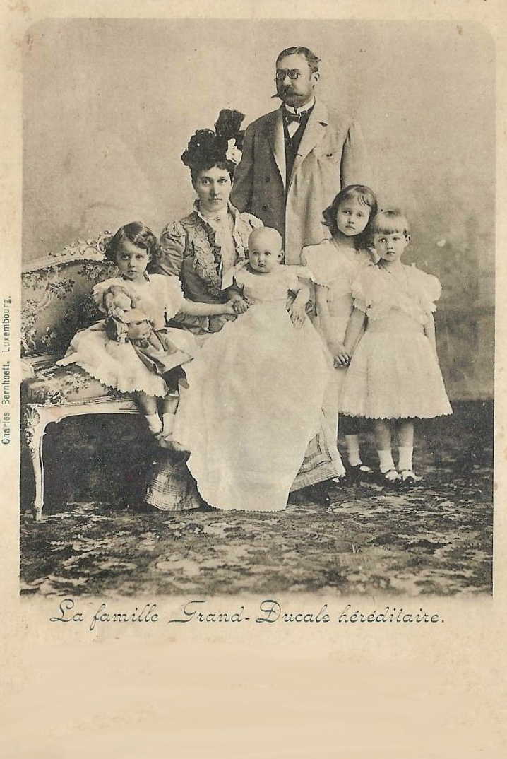 De Wëllem IV. vu Lëtzebuerg mat Fra a véier Prënzekanner.